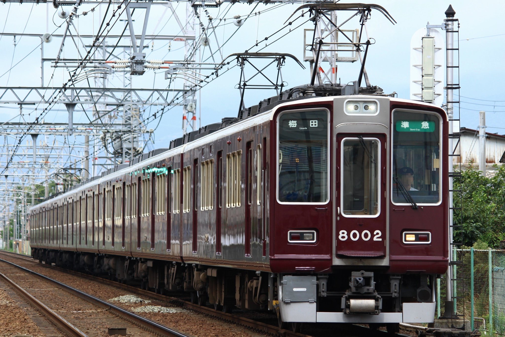 阪急8000系8002f 準急梅田 阪急神戸線阪急塚口-武庫之荘